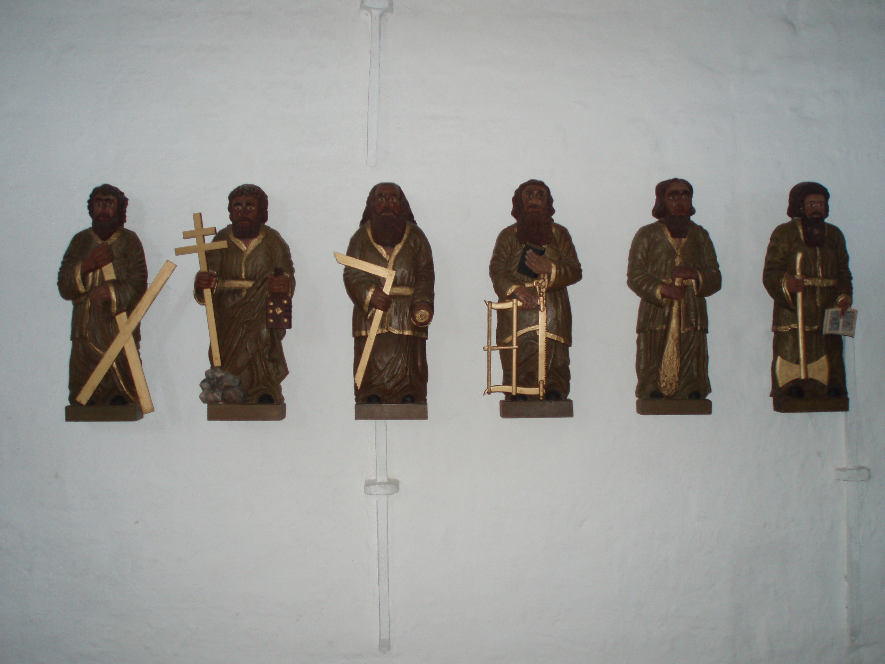 Jelling Kirke in Jelling, Denmark. Six apostles. Photographer: User:Brams